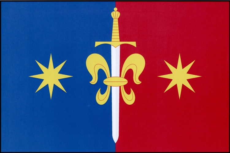 Vlajka, Svojšice, okres Příbram